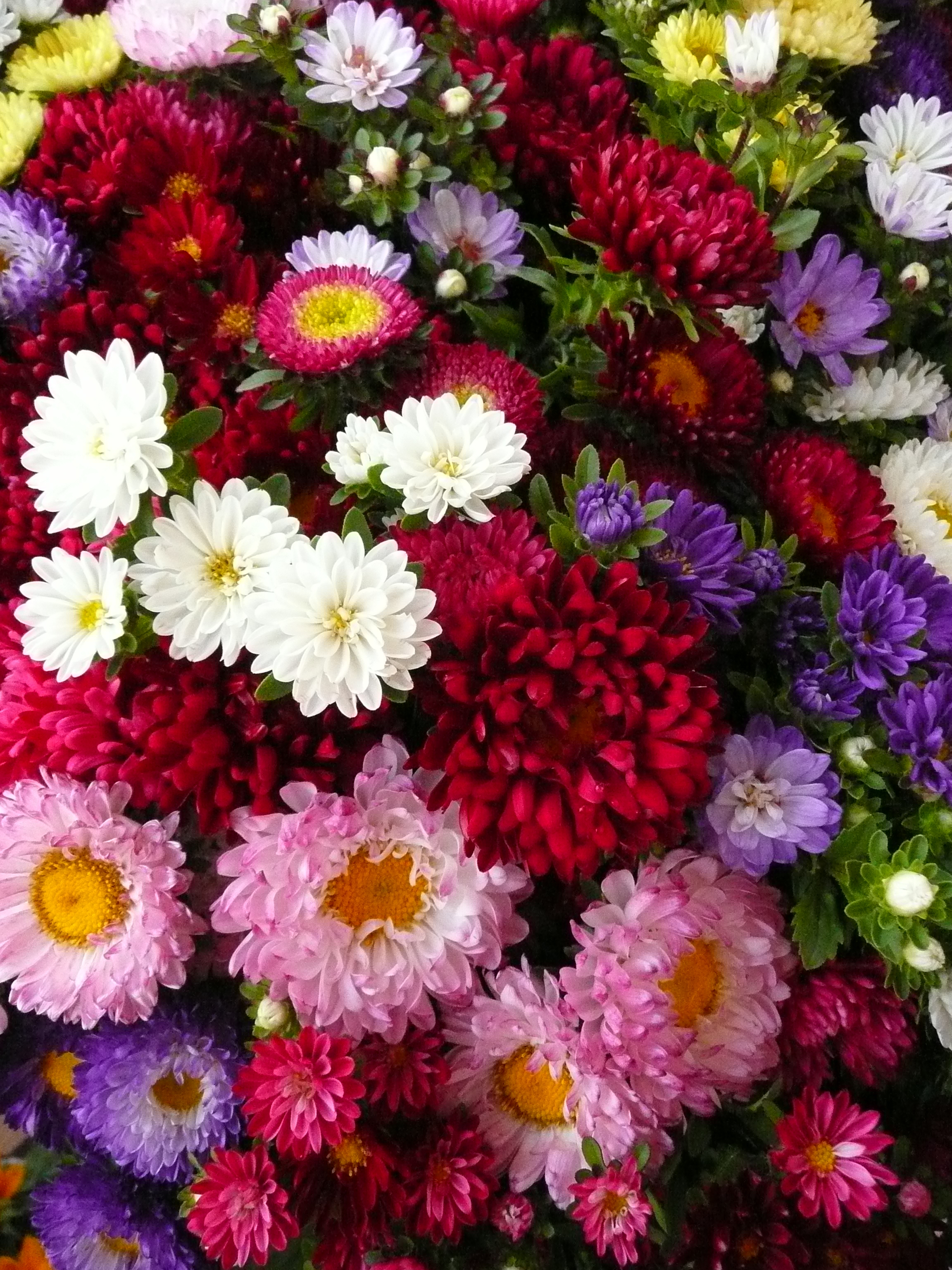 Bunter Strauß von Sommerastern (Callistephus chinensis)